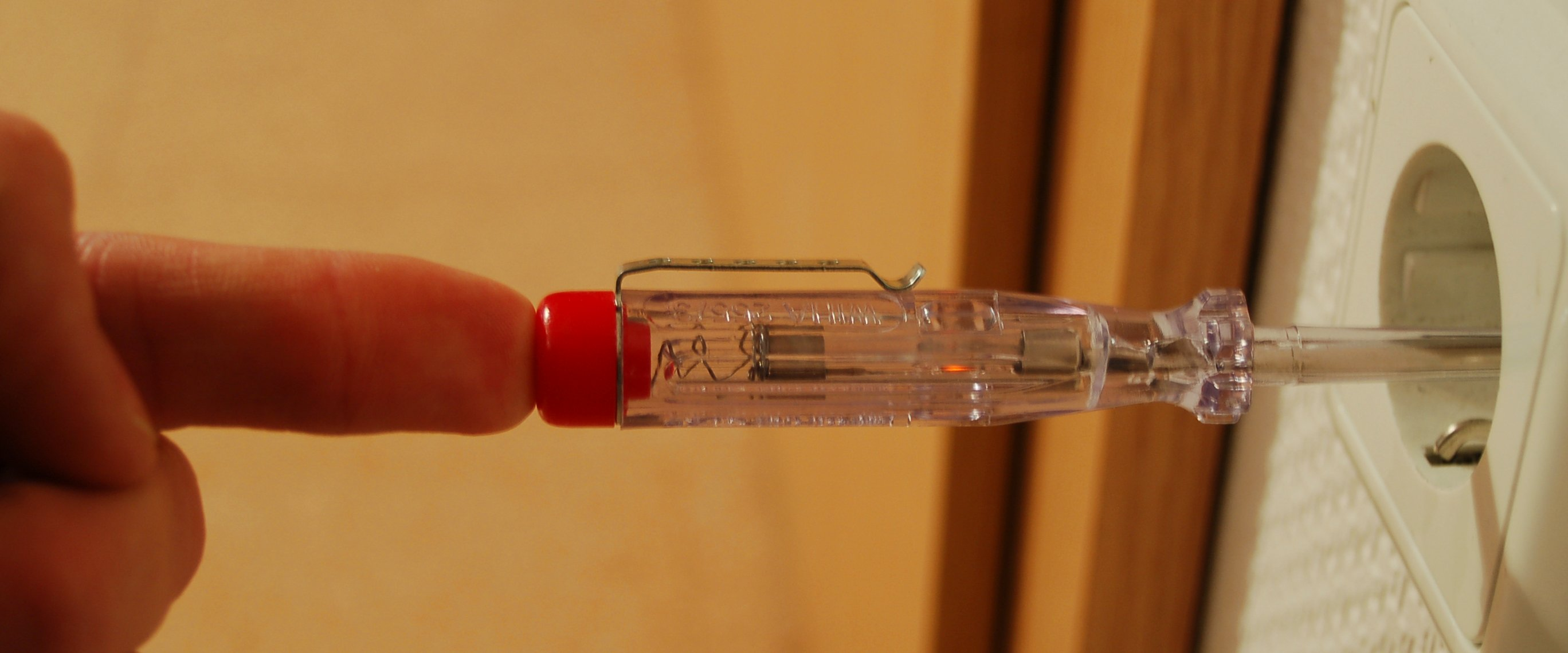 Ein Phasenprüfer im Einsatz